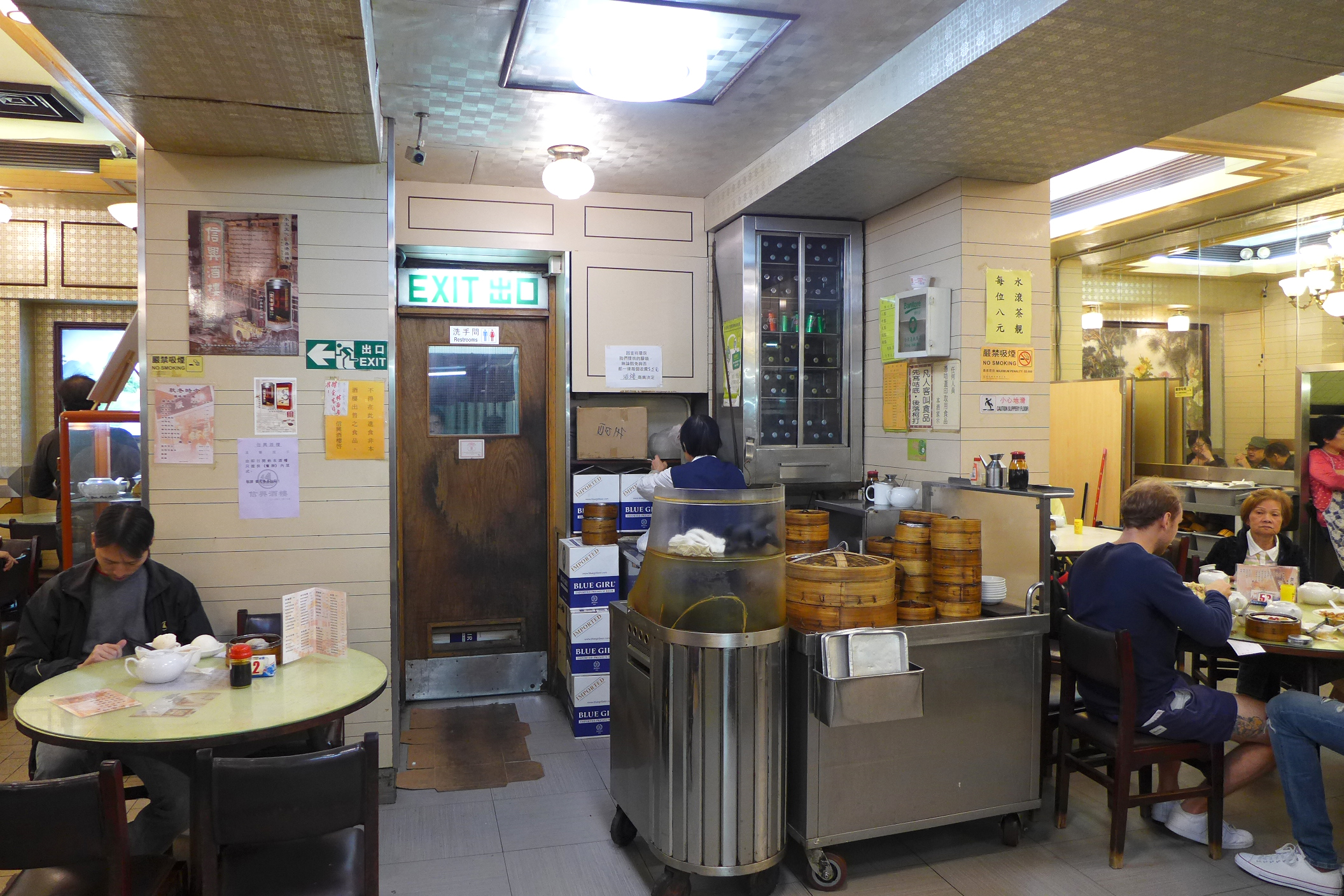 Shun Hing Restaurant Dinsum kiosk